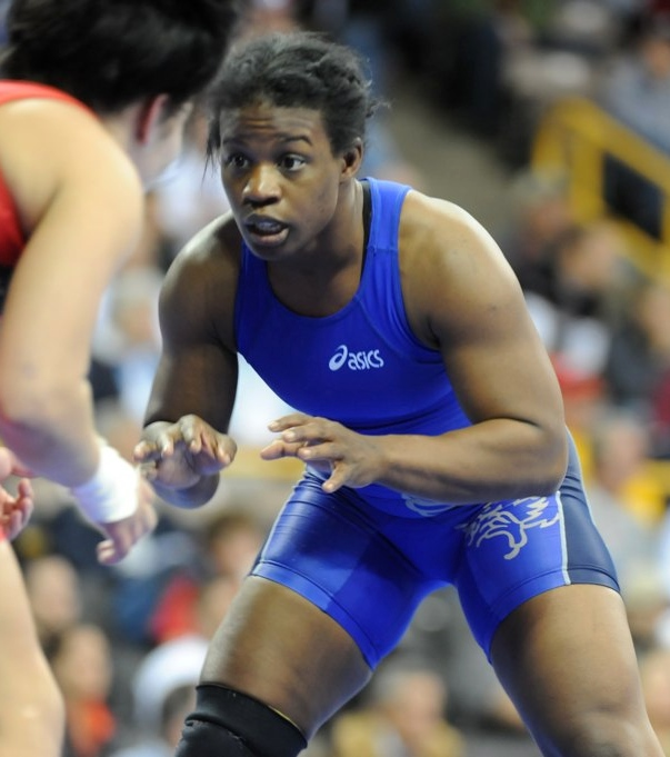 AAB_1321